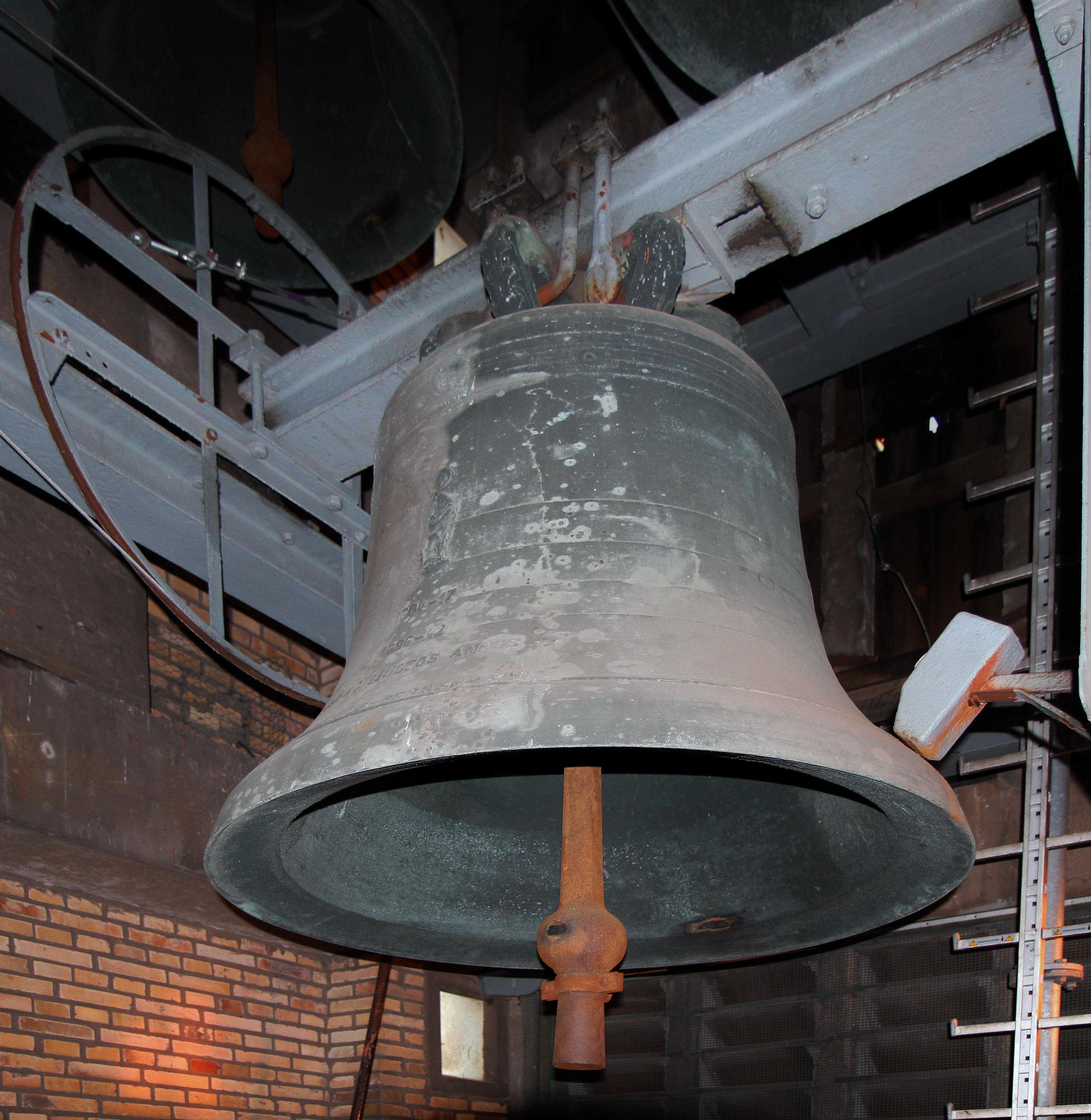 Hürth-Berrenrath, St. Wendelinus: Große Wendelinusglocke mit Stundenschlaghammer